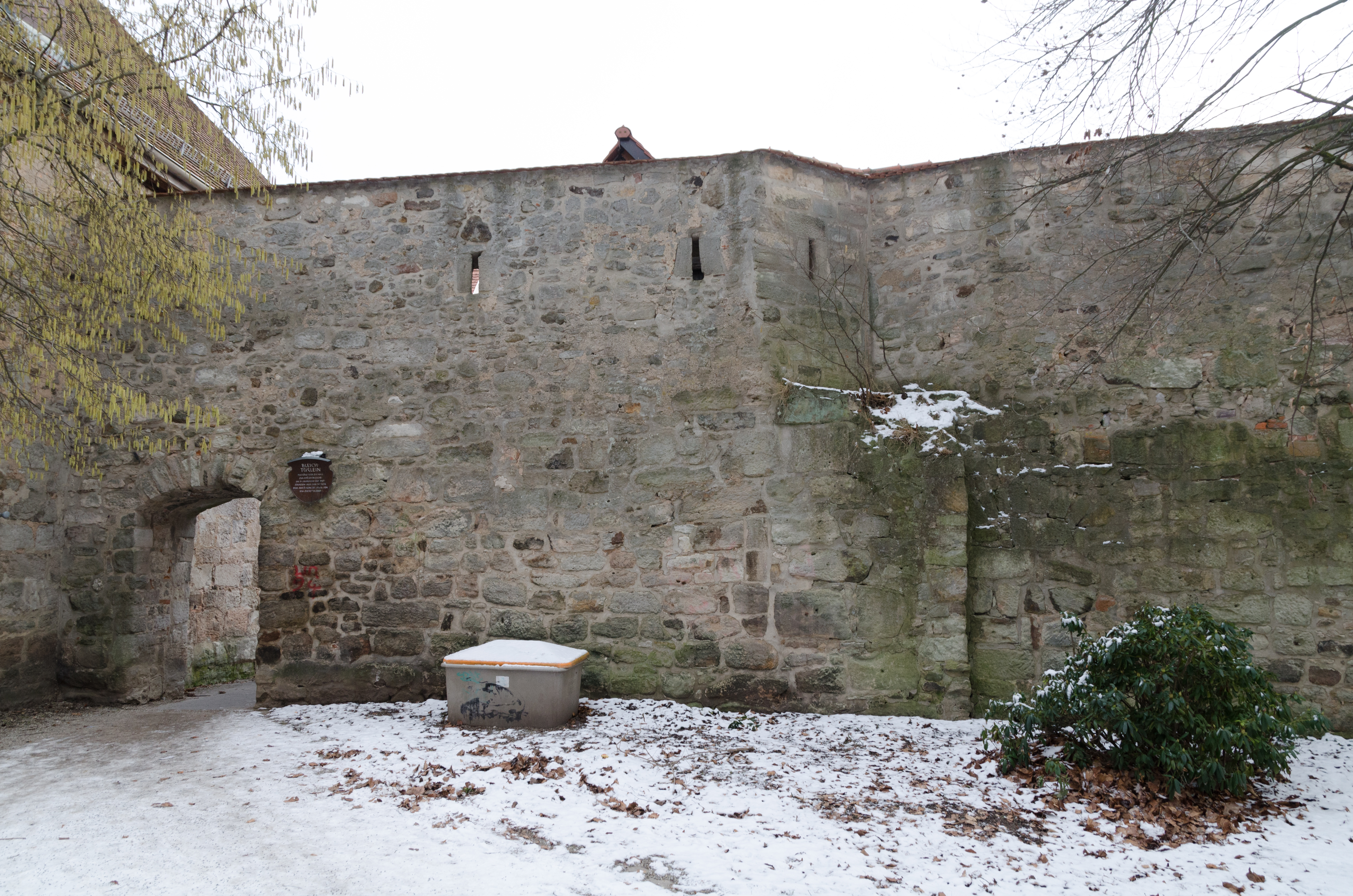 Pulverturm in Neustadt an der Aisch